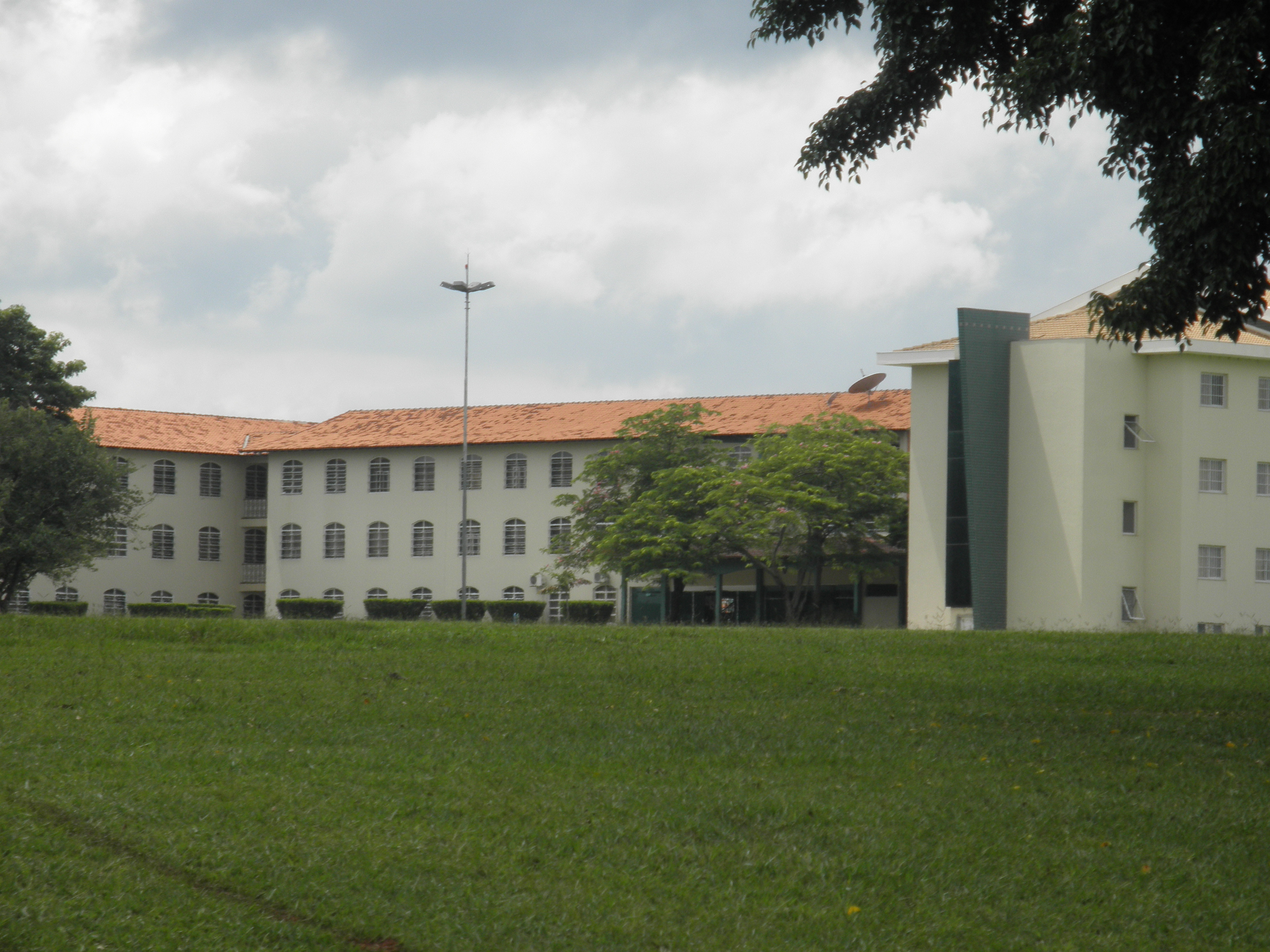 Jardim Luiz Favero, Eng. Coelho - SP, Brazil